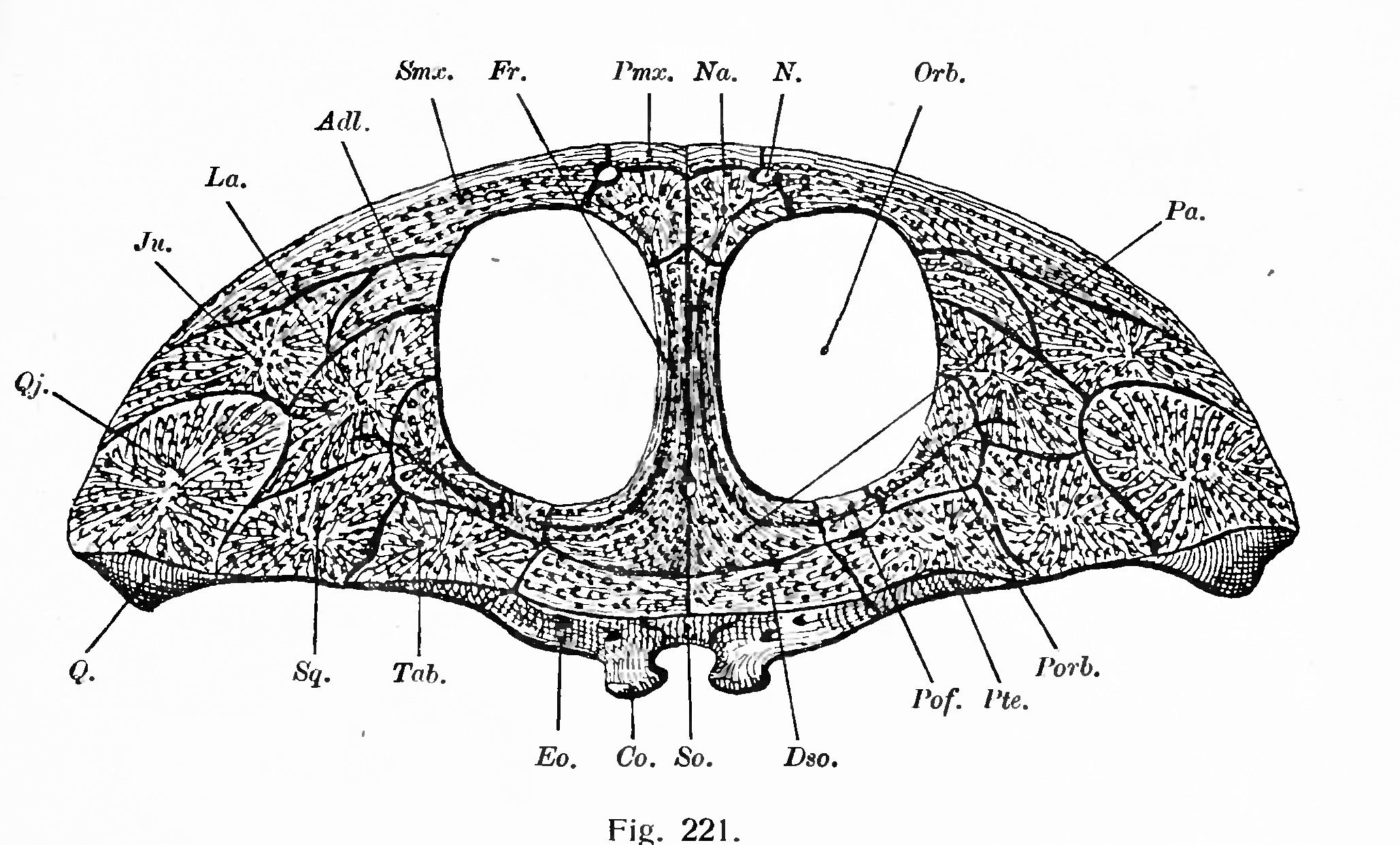 Plagiosternum granulosum scull